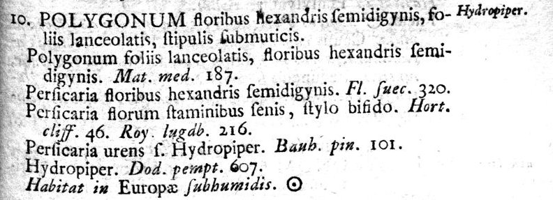 Erstbeschreibung von Polygonum hydropipers in Carl von LinnÃ©s Species Plantarum, Band 1, Seite 631